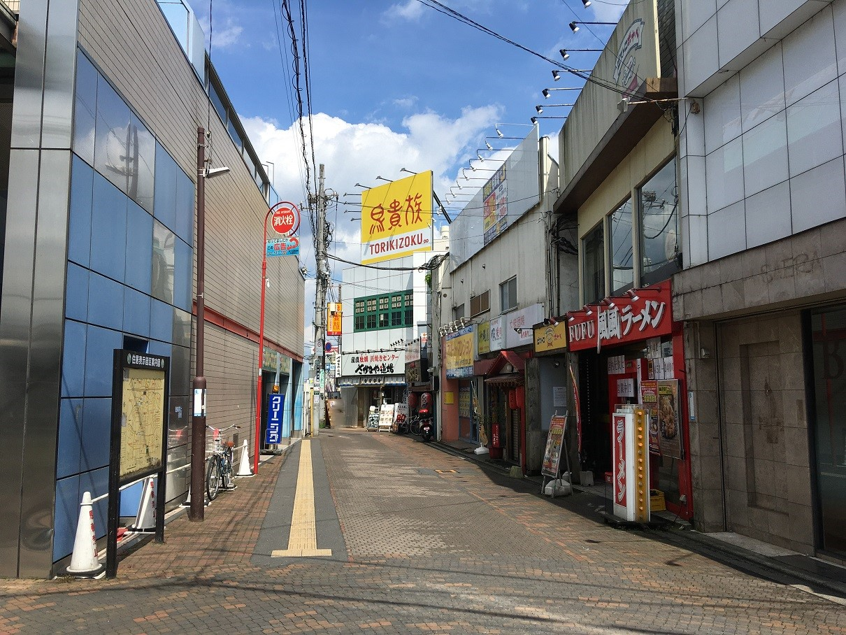 田無駅南口駅前通り